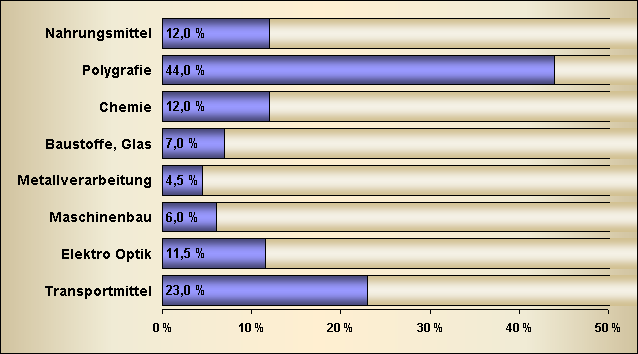 Verarbeitende Industrie der Hauptstadt Prag (in Prozent 2002) Legende: Anteile der Wirtschaft der Hauptstadt Prag an der Gesamtwirtschaft der Tschechischen Republik, in Prozent, 2002, in laufenden Preisen Ausgewählte Branchen und Subbranchen (in Klammern: Kennziffer nach der Klassifikation OKEČ/NACE): Nahrungsmittel: Nahrungs- und Genussmittel, Getränke (ohne Tabakindustrie) (15) Polygrafie (22) Chemie: einschl. pharmazeutische Industrie (24) Baustoffe: einschl. Produkte aus Mineralien (Glas, Porzellan, Keramik) (26) Metallverarbeitung (28) Maschinenbau (29) Elektro Optik: Elektro-, Fernseh- und Rundfunkgeräte, Büromaschinen, optische und medizinische Geräte (30-33) Transportmittel: verschiedene Transportmittel außer Kraftfahrzeuge (35)